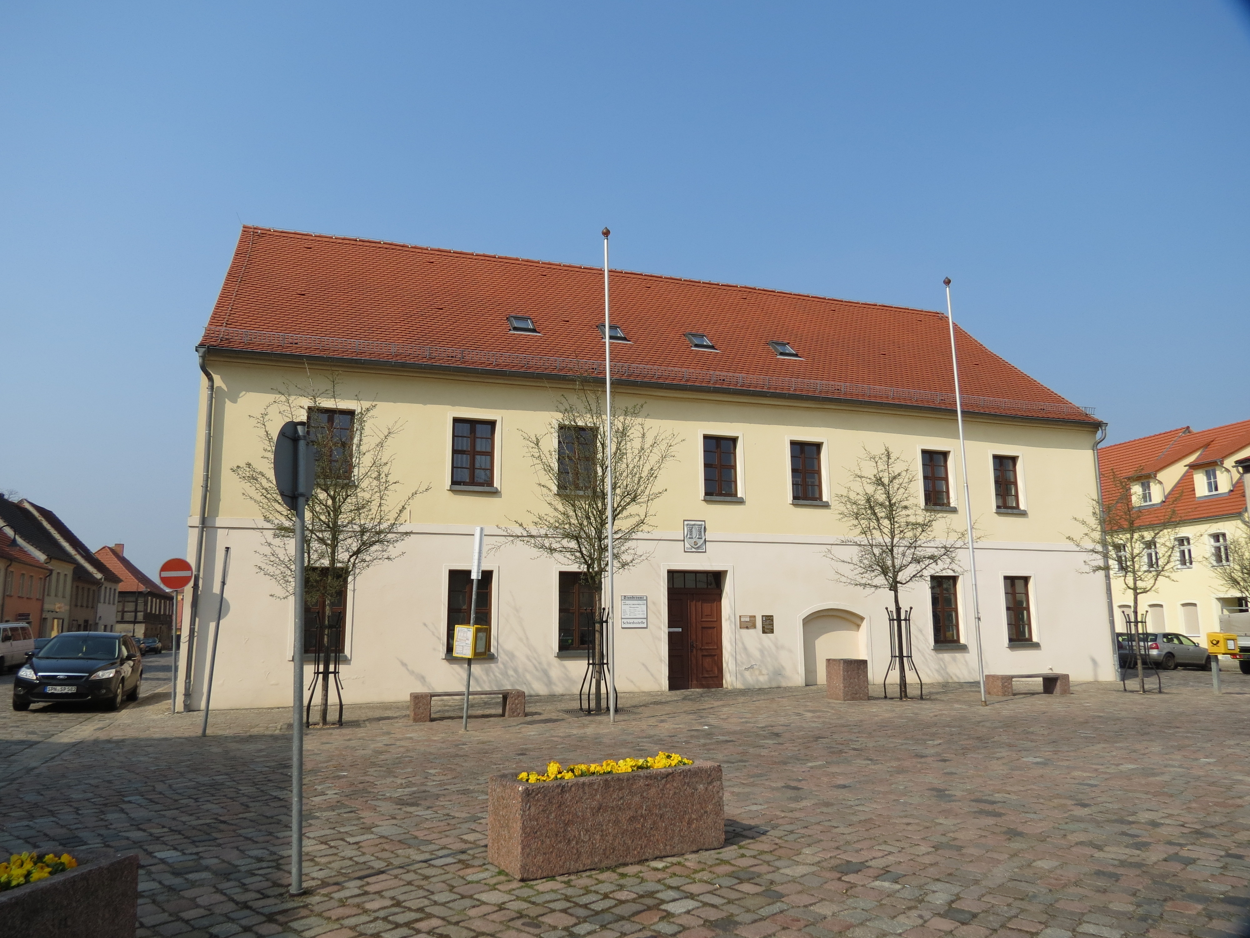 Rathaus der Stadt Lieberose, Sitz des Amtes Lieberose/Oberspreewald, Markt 4, Lieberose, Landkreis Dahme-Spreewald, Brandenburg, Deutschland